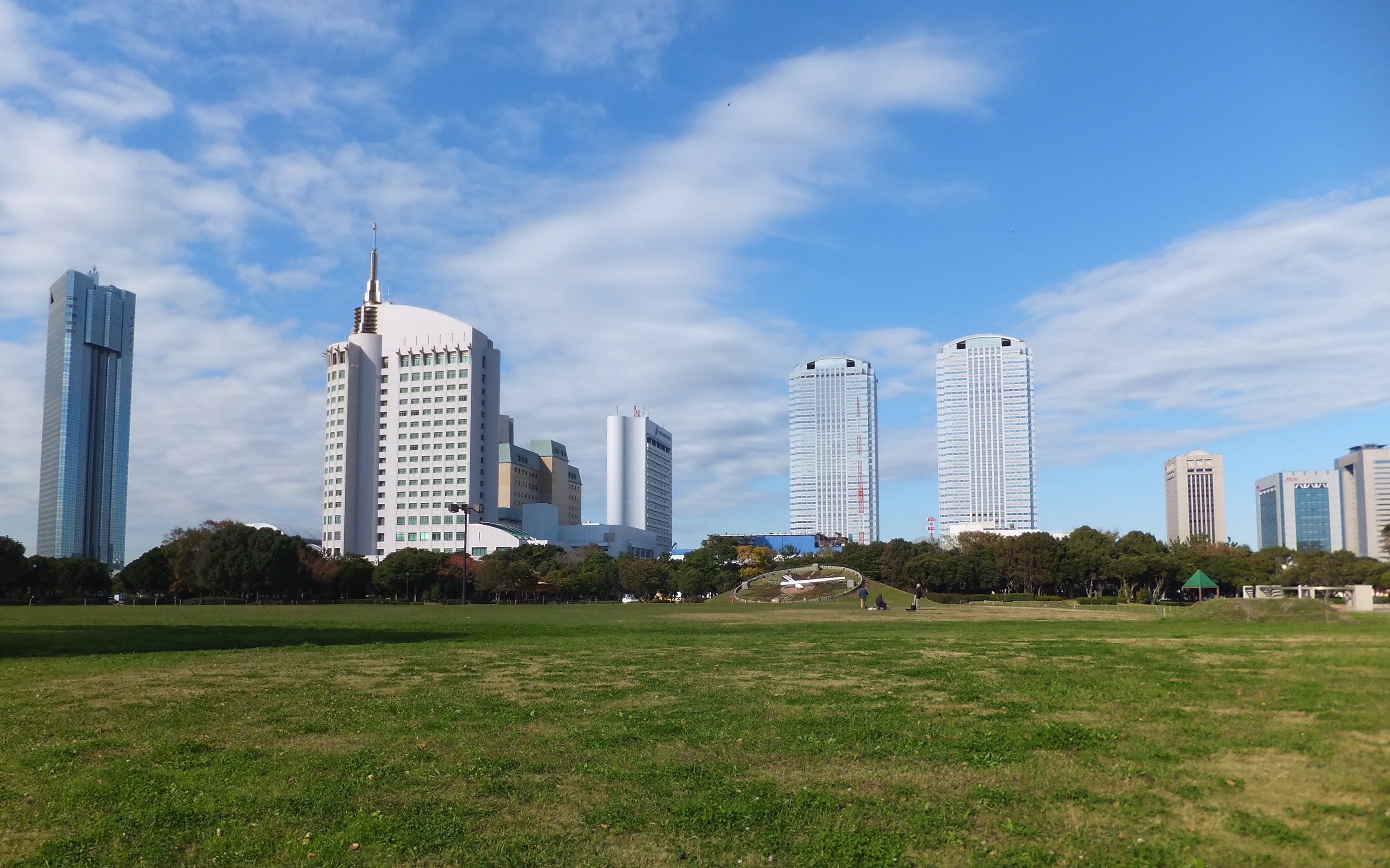 幕張海浜公園より、幕張新都心を望む。